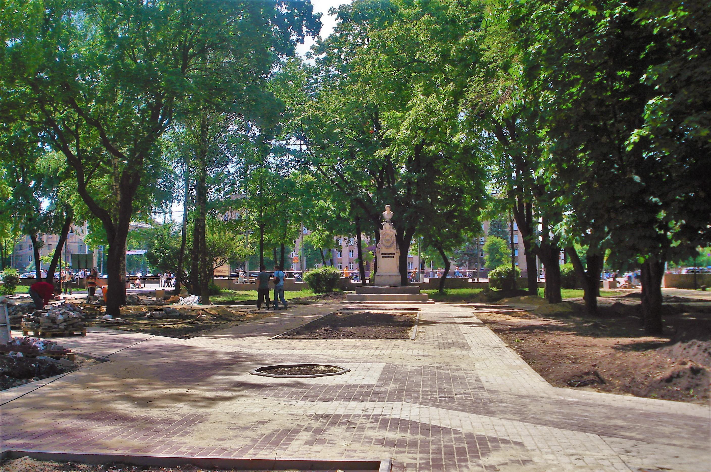 Аллея в сторону памятнику А.В.Кольцову в Кольцовском сквере